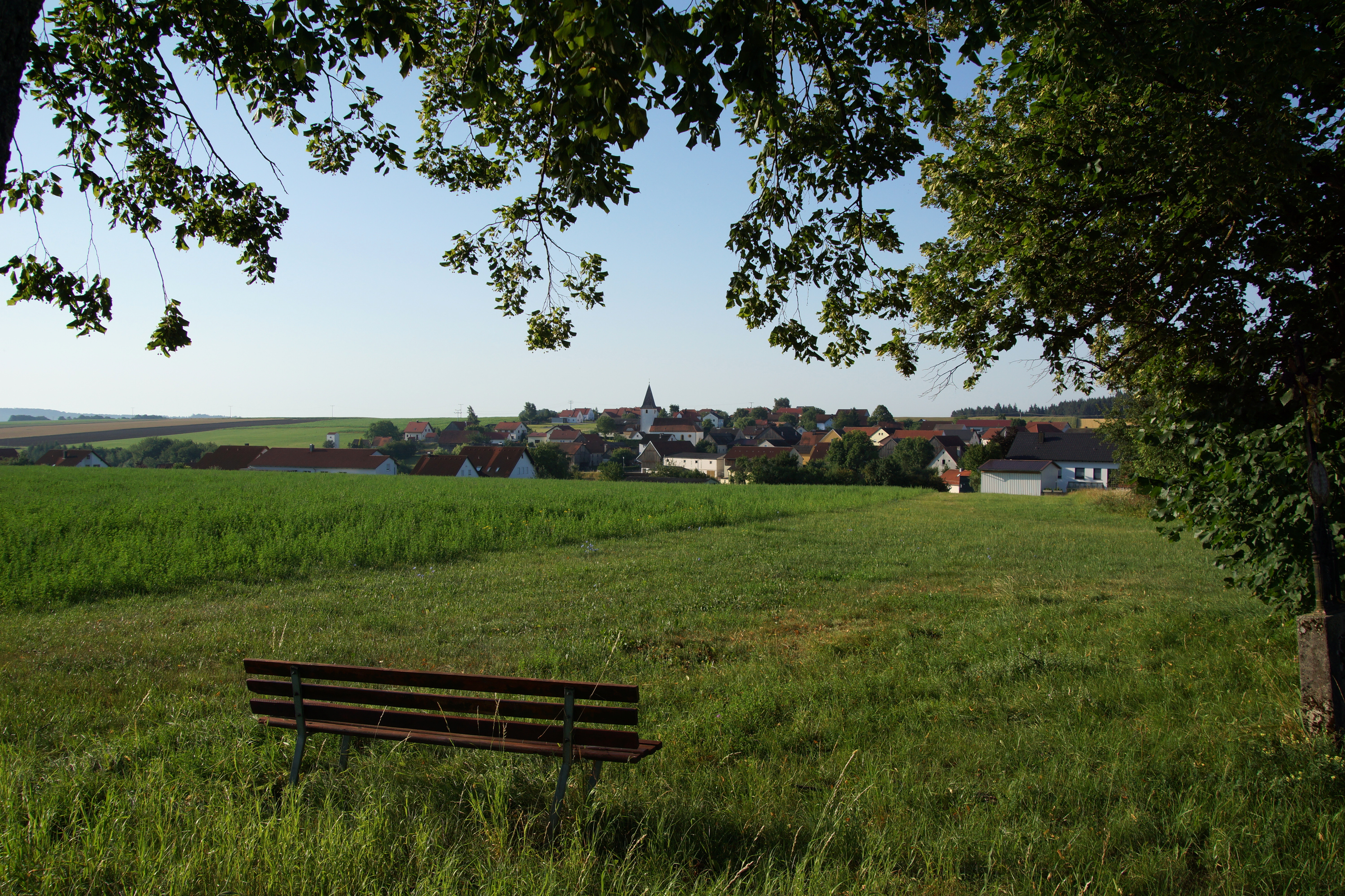 Döllwang bei Deining in der Oberpfalz: Ortsansicht